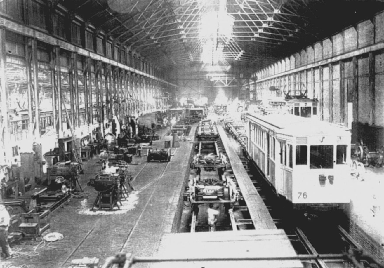 Vista general con una formación detenida